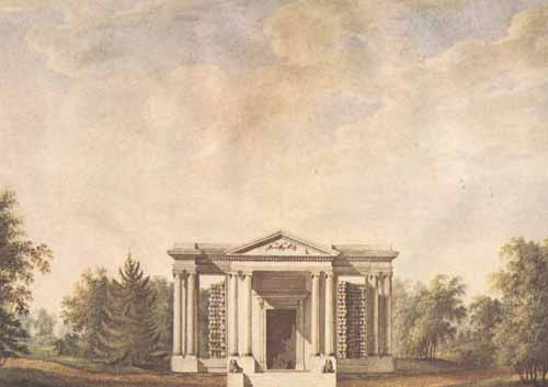 Портал "Маска" перед Березовым домиком в Гатчине